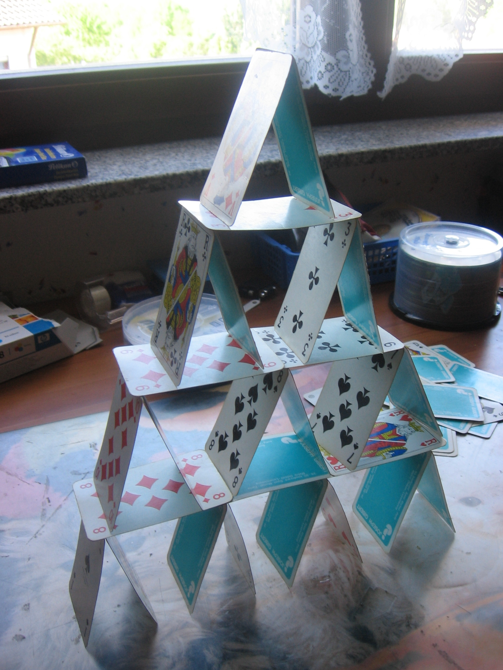 Kartenhaus